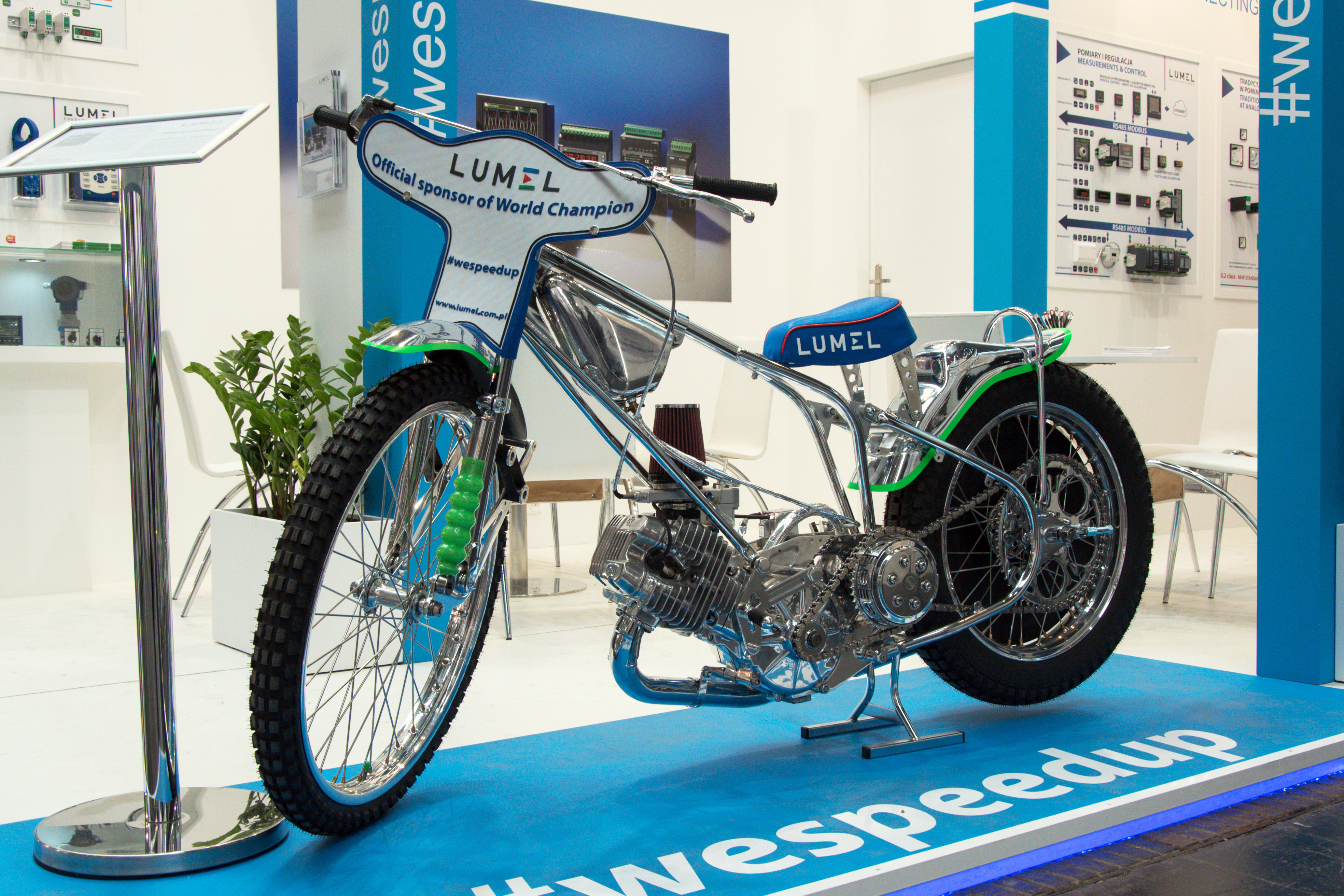 Speedwaymotorrad von Patryk Dudek auf der Hannover-Messe 2017